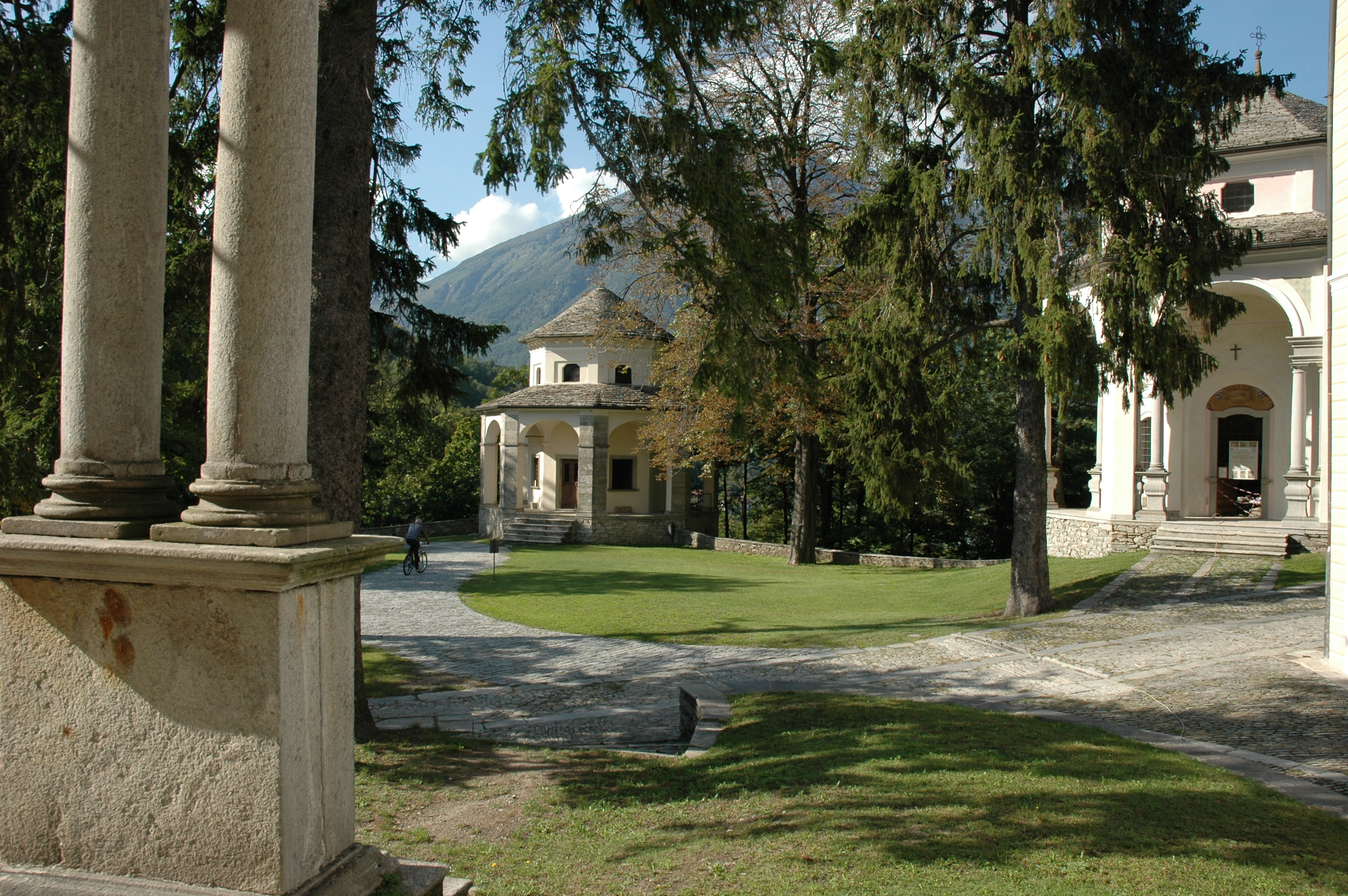 Sacro Monte di Domodossola. Cappella 9 (La terza caduta) e Cappella 11 (La Crocefissione).